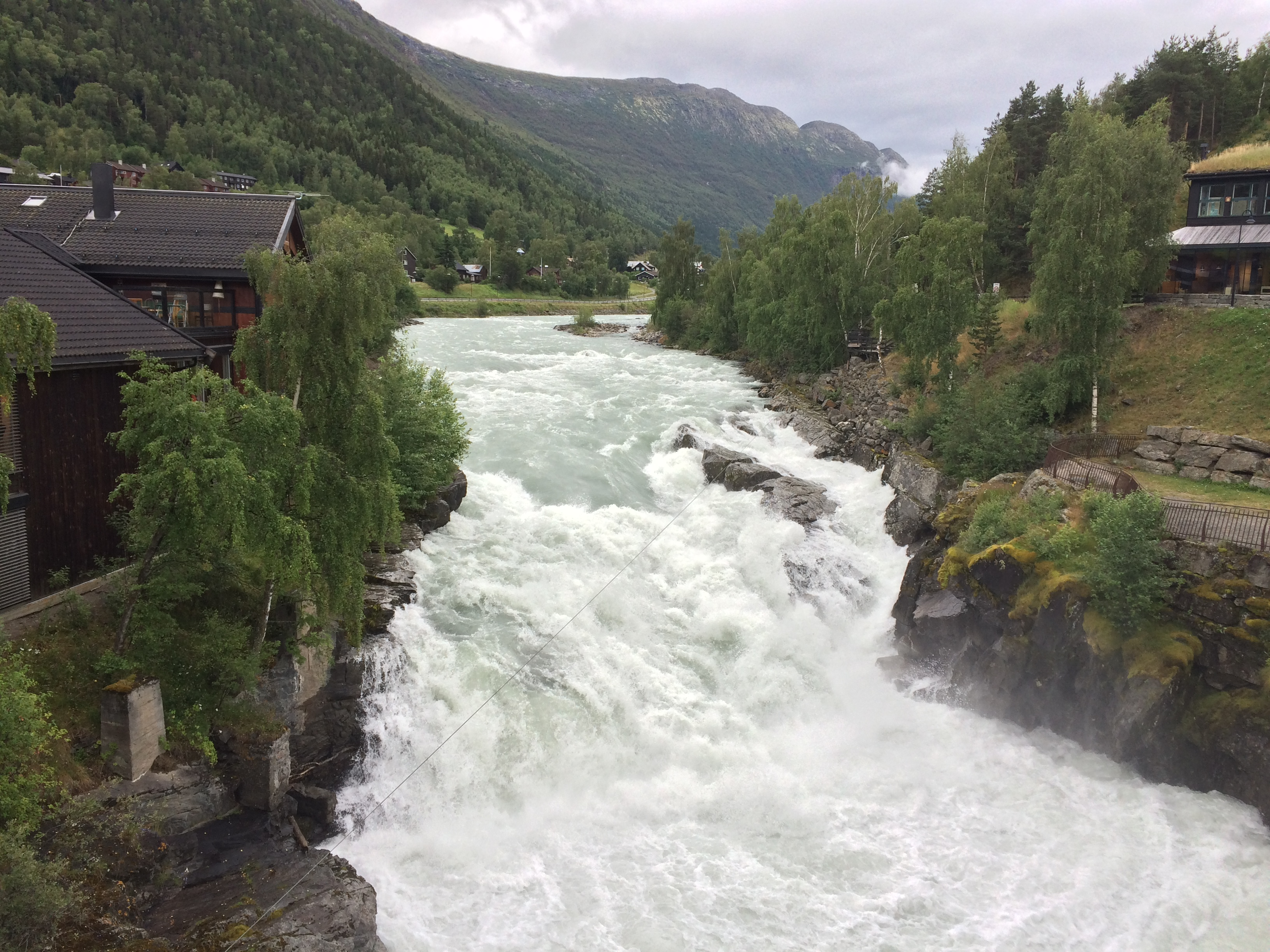 Prestfossen i Fossbergom